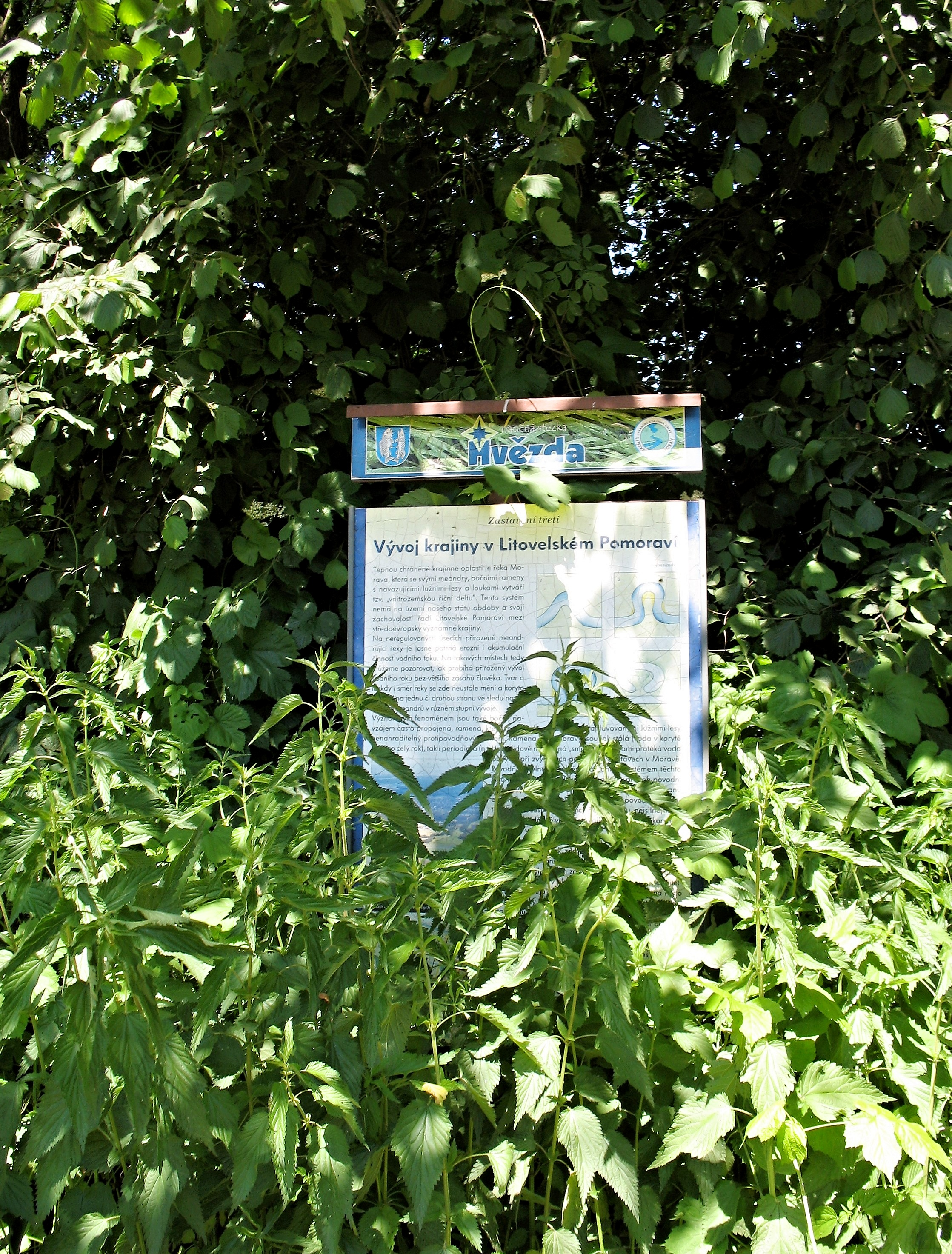 Informační tabule naučné stezky Hvězda v Litovli